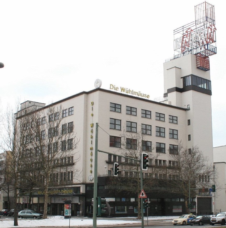 Bildausschnitt, der nun ausschließlich die Spielstätte Die Wühlmäuse am Theodor-Heuss-Platz in Berlin-Westend ohne Umgebung zeigt